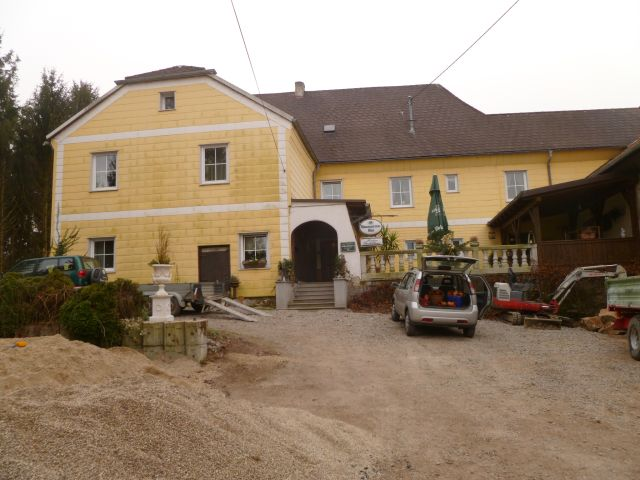 SChloss Schörgern heut